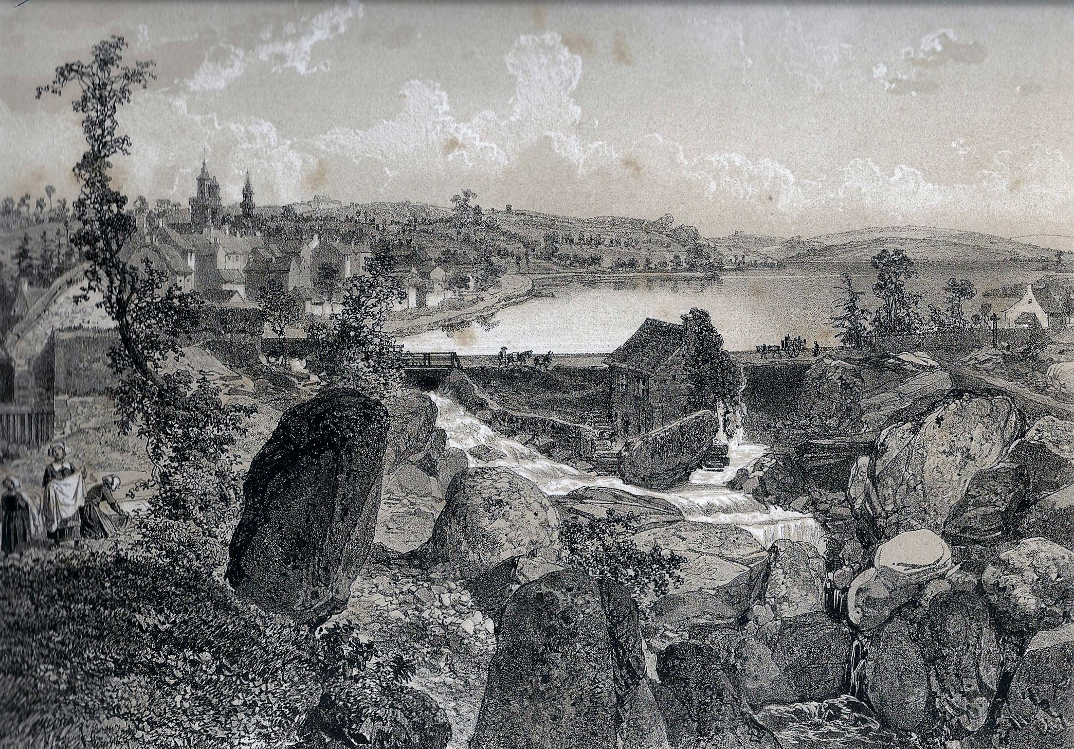 Le Huelgoat en 1867 (dessin de Félix Benoist publié dans "La Bretagne contemporaine", tome "Finistère", en 1867)